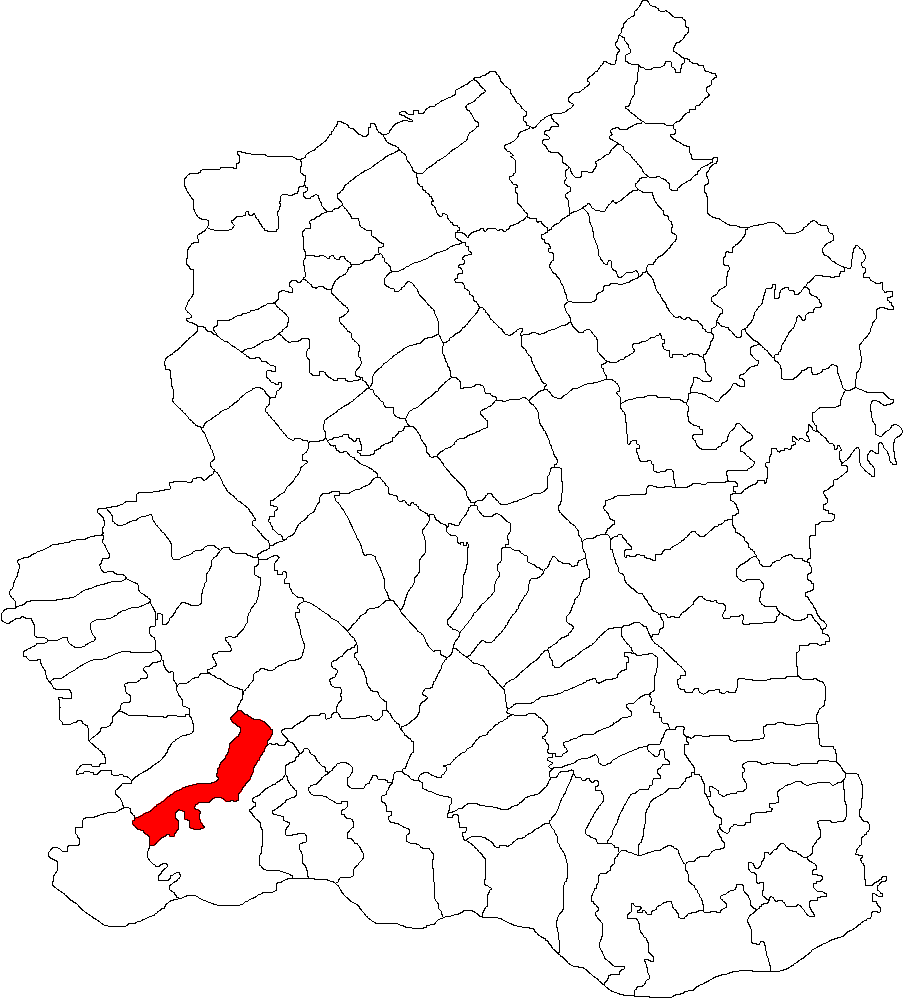 Categorie:Hărţi ale judeţului Teleorman